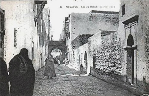 Mellah of Mogador (now Essaouira)